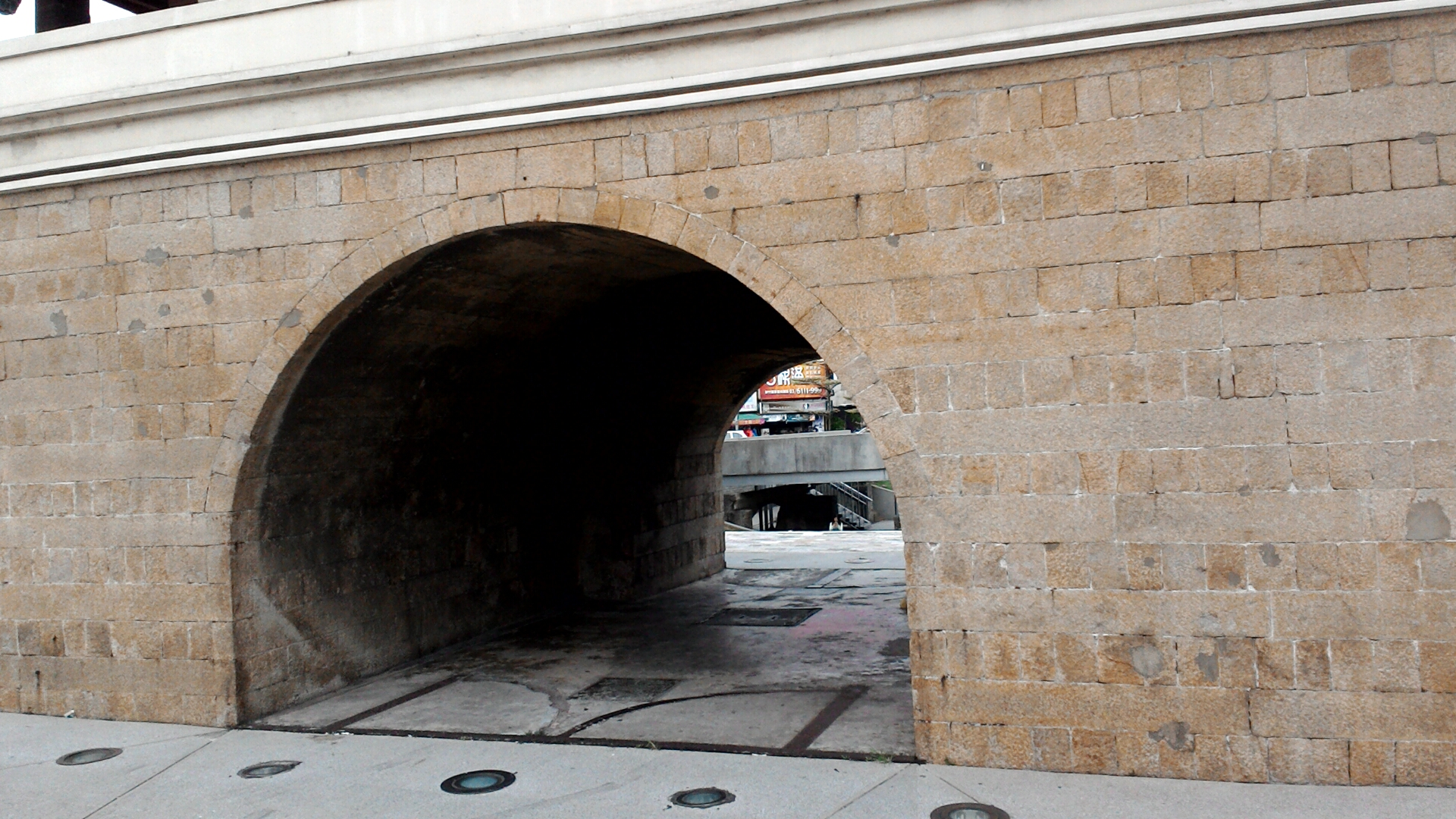 竹塹城迎曦門城門洞,台灣省新竹市東區東門聯里中正里